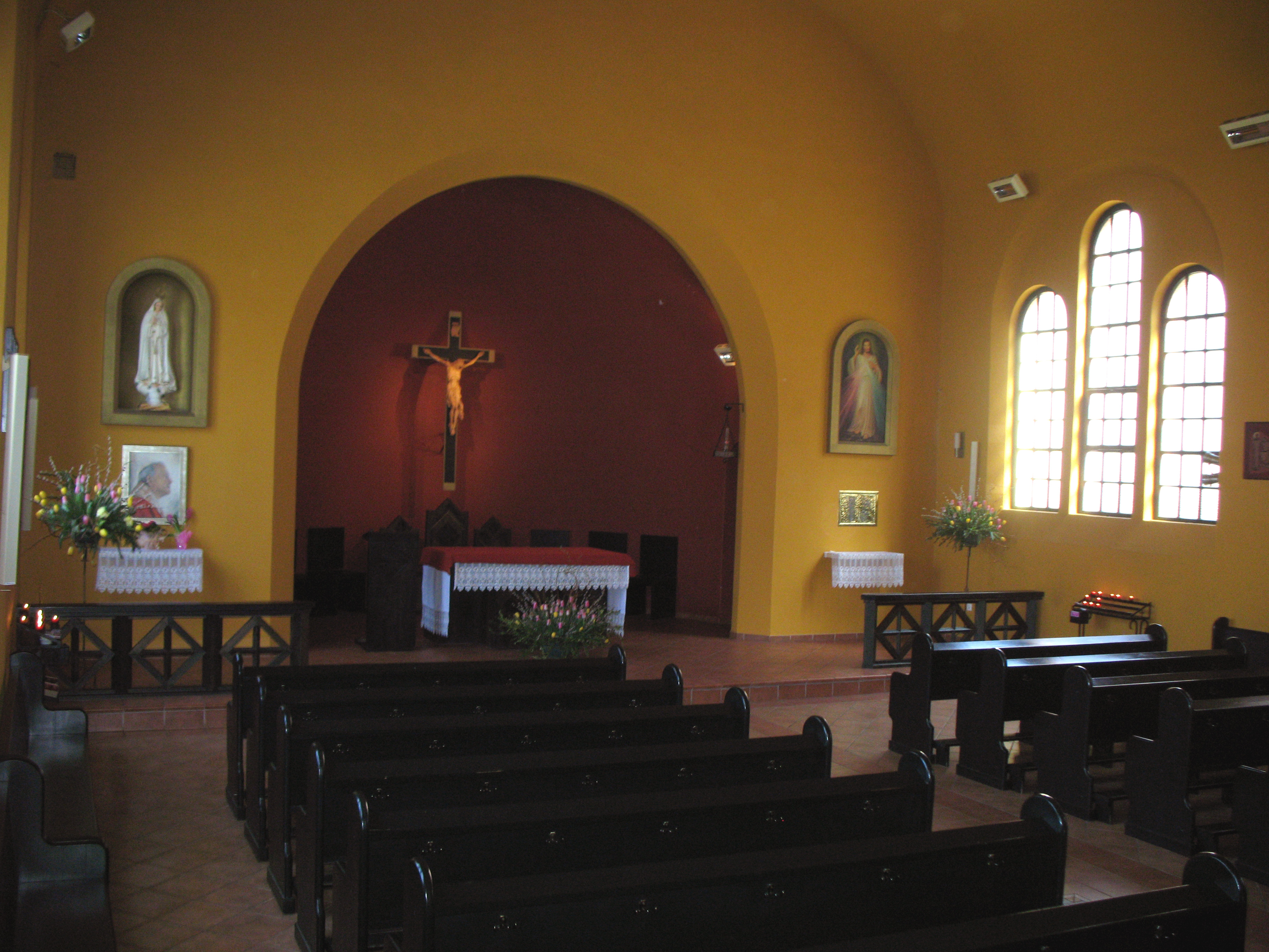 Wrocław, kościół św. Jerzego - wnętrze. Dawniej parafialny. ul. Ojców Oblatów, Popowice